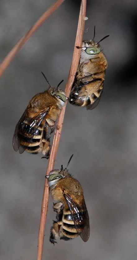 Amegilla sp. (probably A. albigena) Palermo